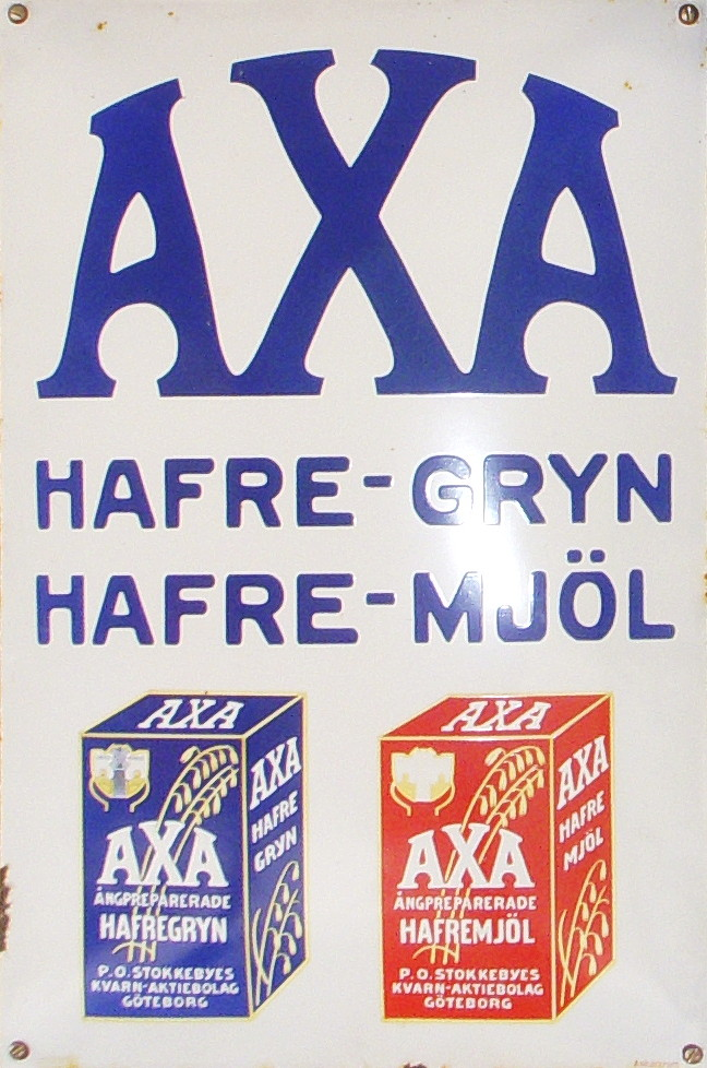 Äldre emaljskylt för AXA:s produkter